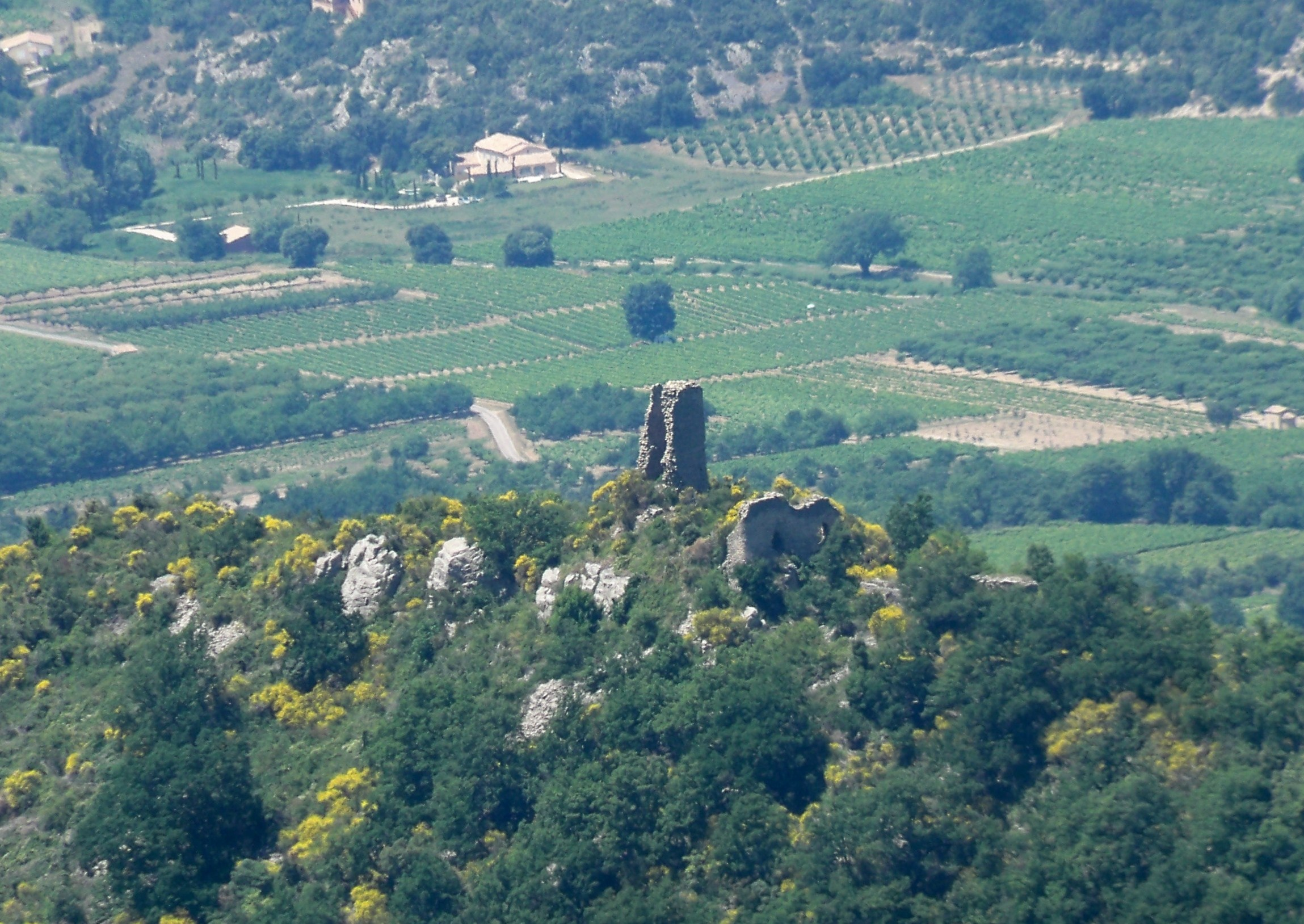 Vue sur le vieux Beaumont du Ventoux depuis les pentes nord du Mont Ventoux, tour en ruine